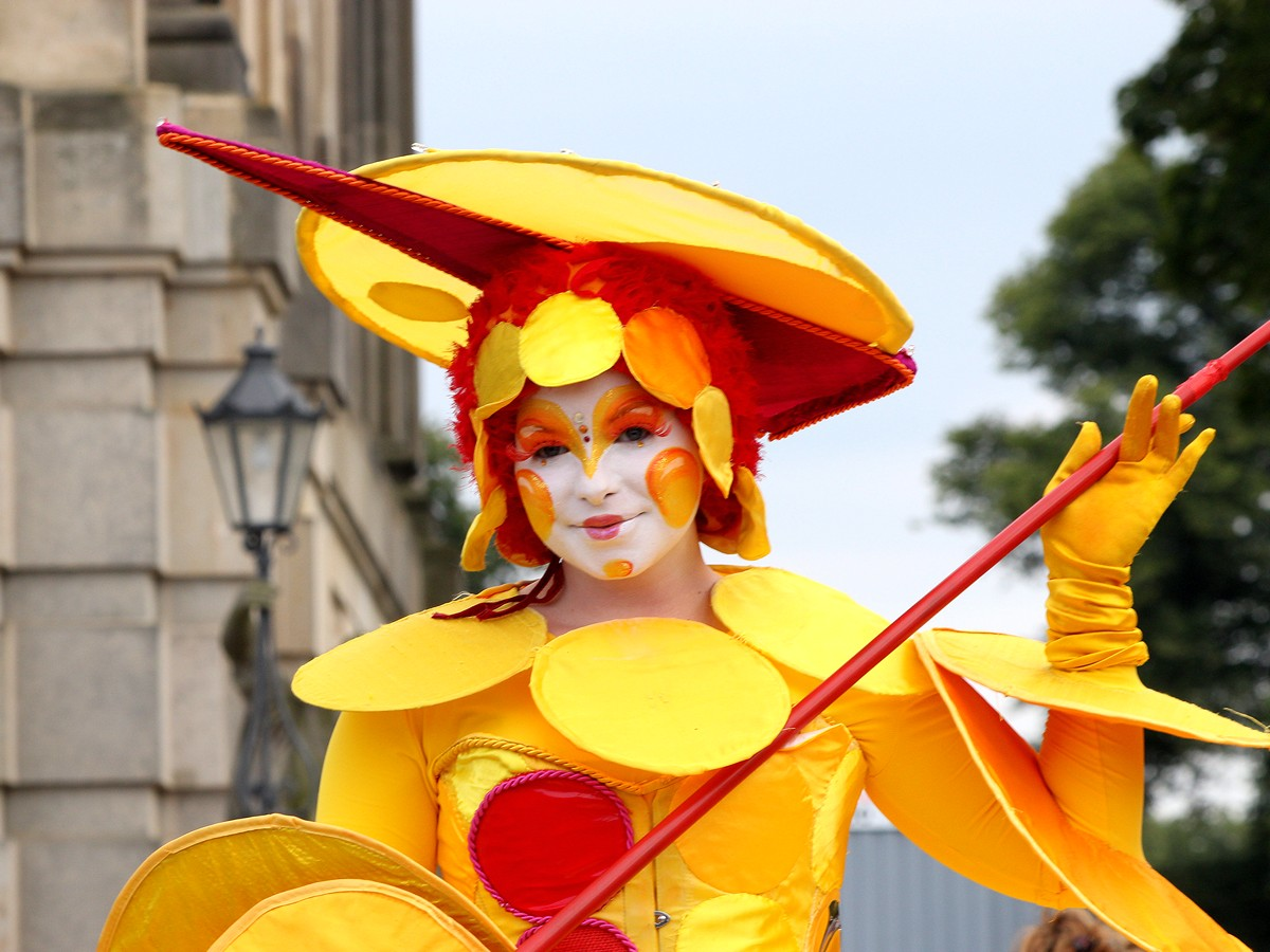 Kostümierte Stelzenläuferin (Sandra, Art Tremondo) beim Kleinen Fest im Großen Park, Ludwigslust. Kostüm: digaudi/Sol [1]